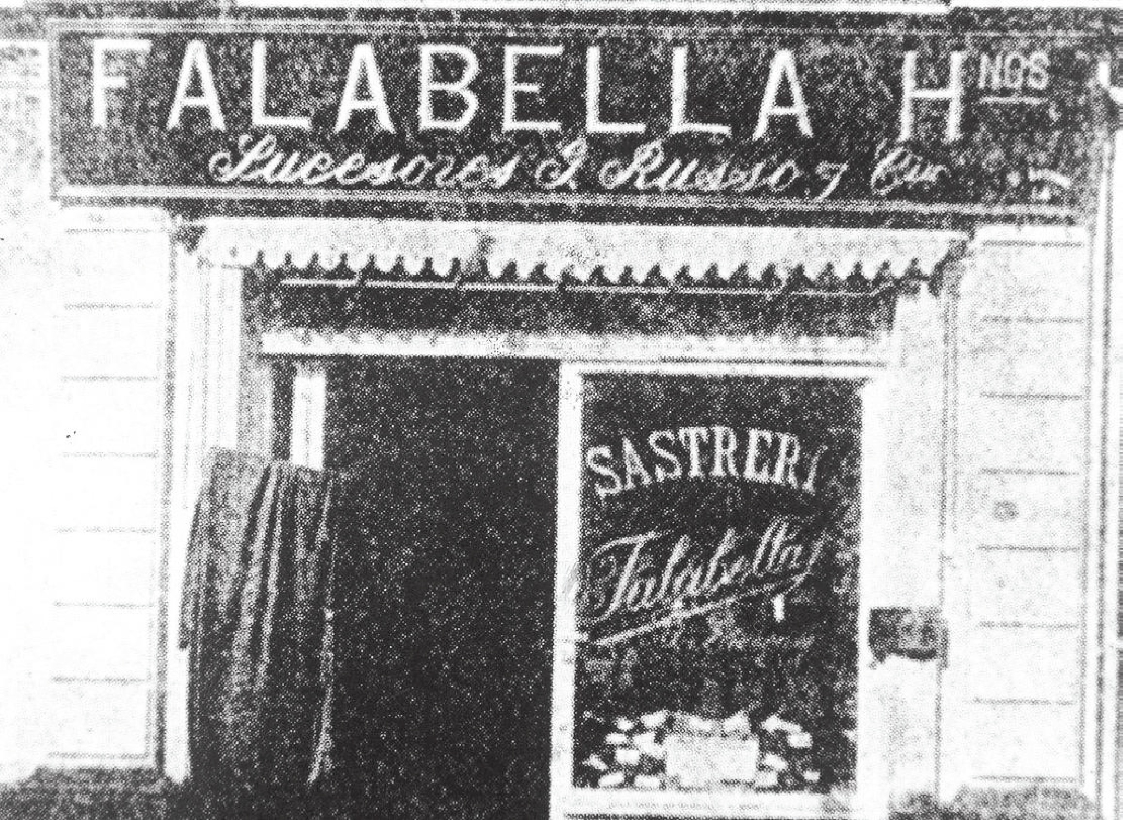 Falabella lo fundó Salvatore Falabella en 1889 como una sastrería. Actualmente Falabella (S.A.C.I. Falabella) es un holding Chileno, comercializador de productos que opera bajo los conceptos de tiendas por departamentos, mejoramiento del hogar homecenters, supermercados e hipermercados, con presencia en Chile, Argentina, Perú y Colombia. Sociedad Anónima cerrada hasta 1996 cuando abre sus transacciones en la Bolsa de Comercio de Santiago.